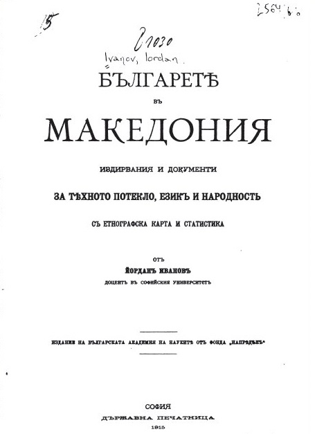 Българете в Македония